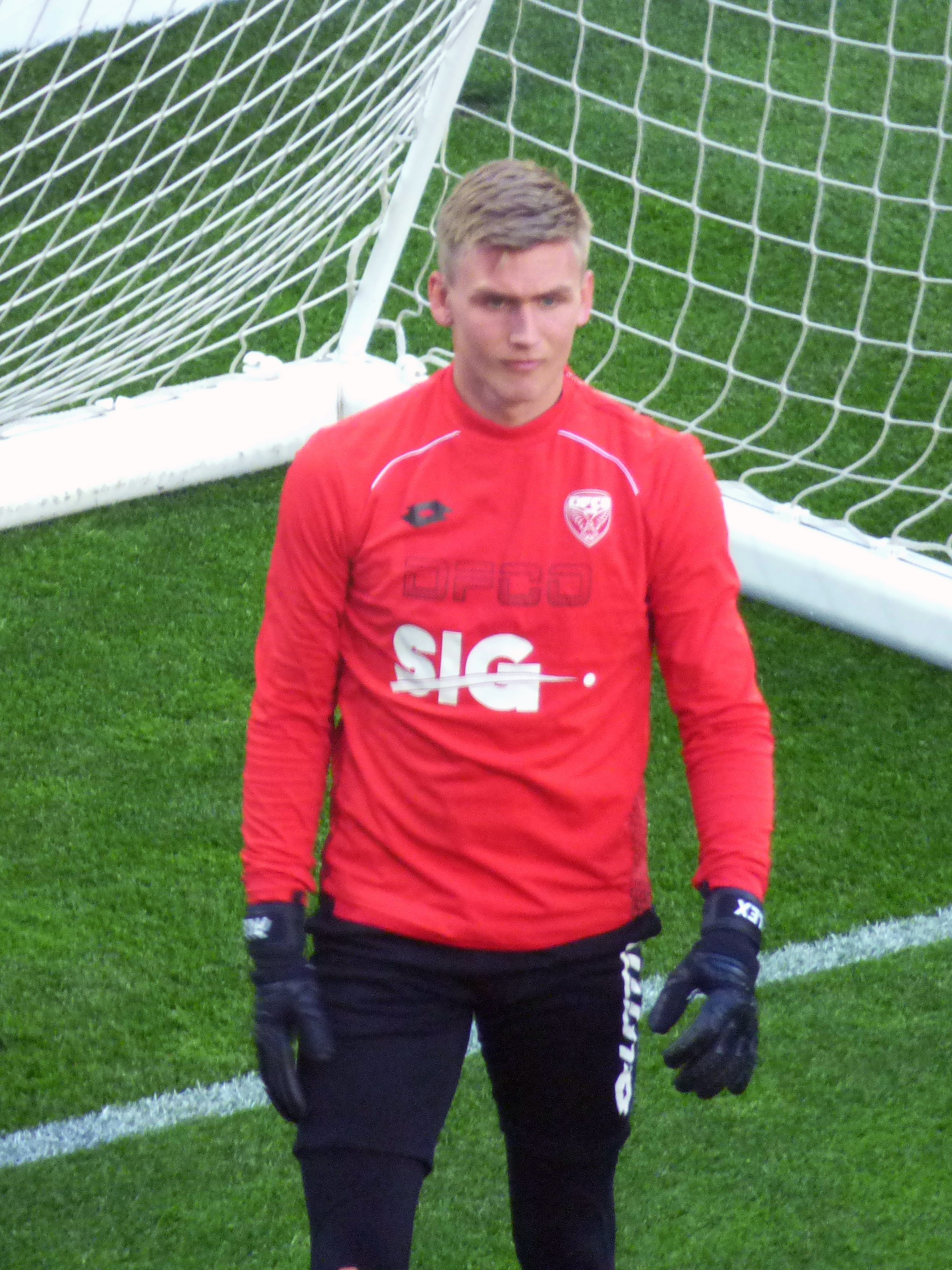 Rúnar Alex Rúnarsson avant le match RC Lens / Dijon FCO, match aller des barrages pour la montée en Ligue 1 2018-2019, le 30 juin 2019, au Stade Bollaert-Delelis.